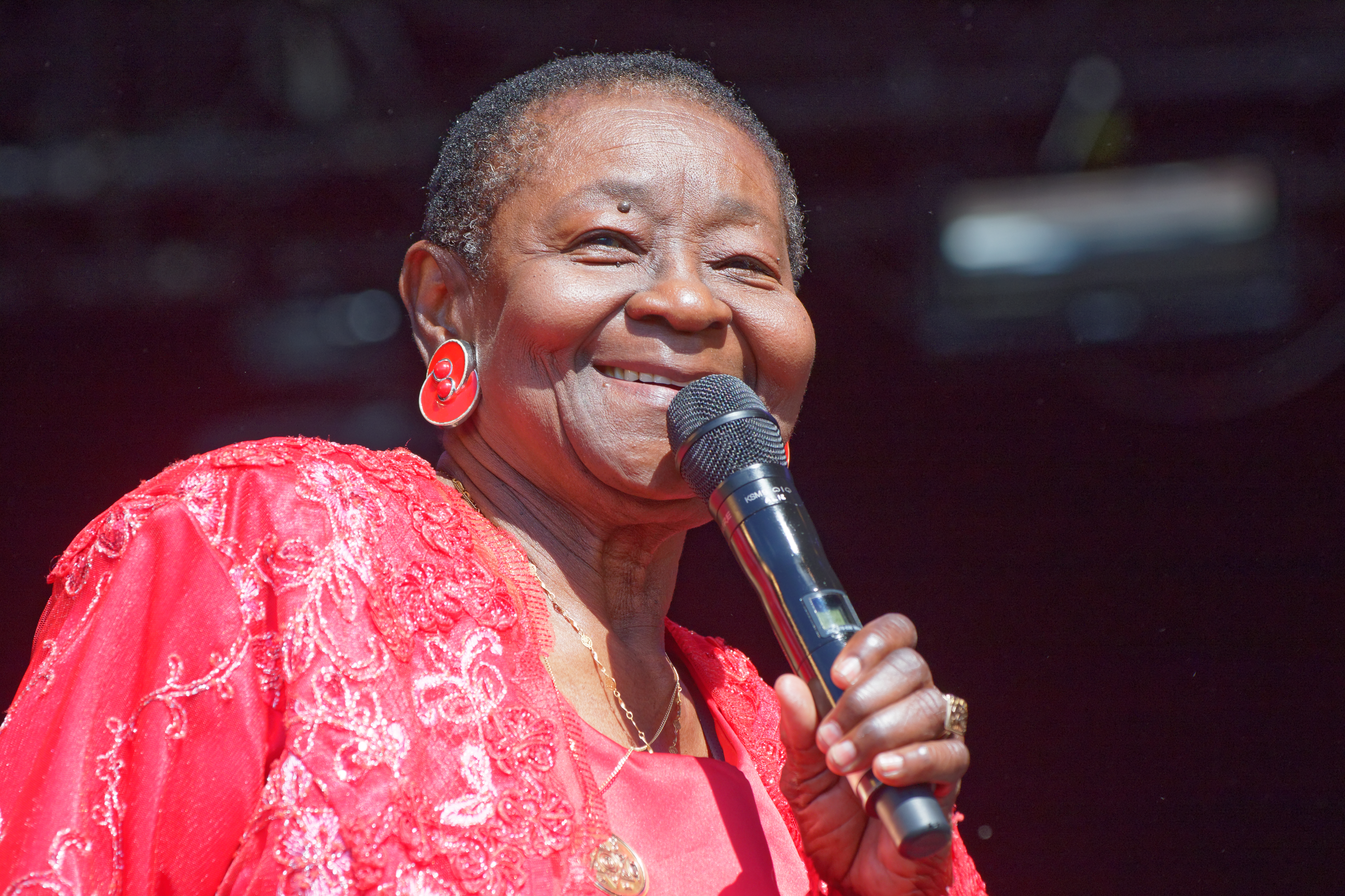 Calypso Rose en concert sur la scène Landaoudec lors du festival du Bout du Monde 2016 à Crozon dans le Finistère (France).